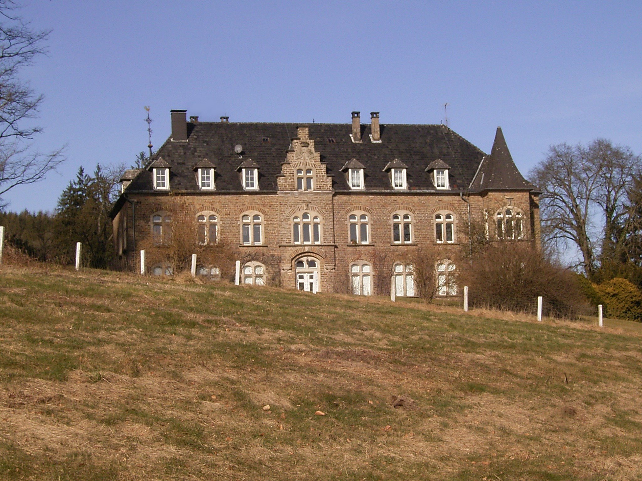 Burg Volperhausen in Morsbach, Bergisches Land. 1892 errichtet von Rudolf Freiherr von Schorlemer, Schwiegersohn der Maria Magdalena von Stumpf-Brentano aus Frankfurt Rödelheim, als Herrenhaus Volperhausen mit markantem massiven Bruchsteinen. Die Kapelle ist der Öffentlichkeit zeitweise zugänglich. Immer noch in Familienbesitz.